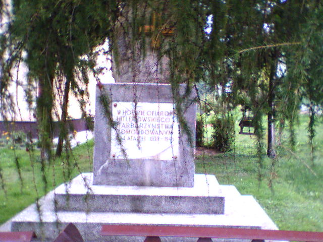 Pomnik.